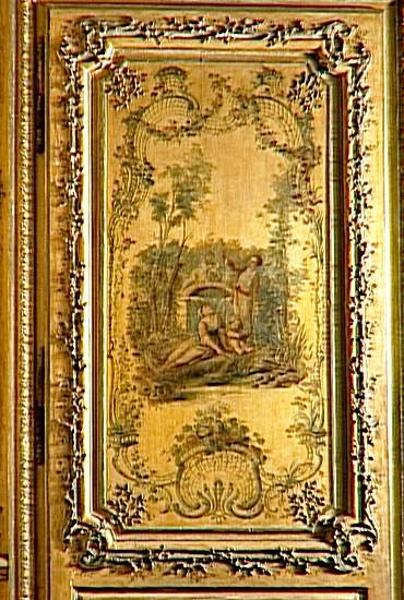 Château de Versailles, Cabinets intérieurs de la Reine, vue intérieure : arrière cabinet, boiseries en vernis Martin provenant du boudoir de Marie-Josèphe de Saxe.